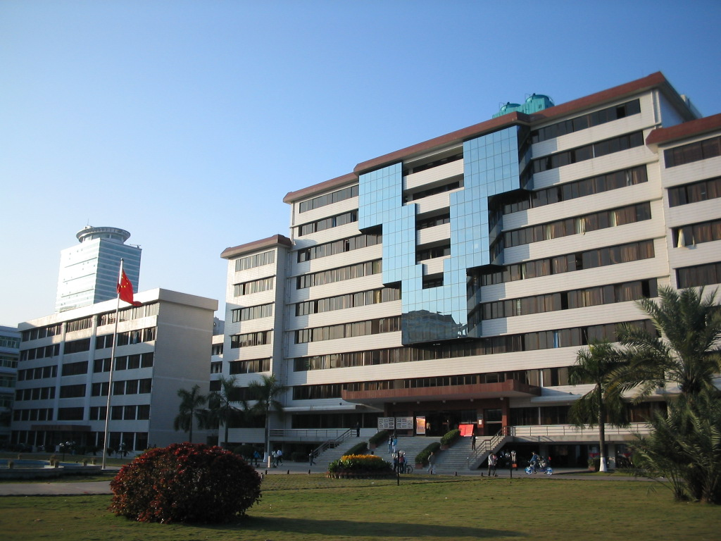 华南师范大学行政楼